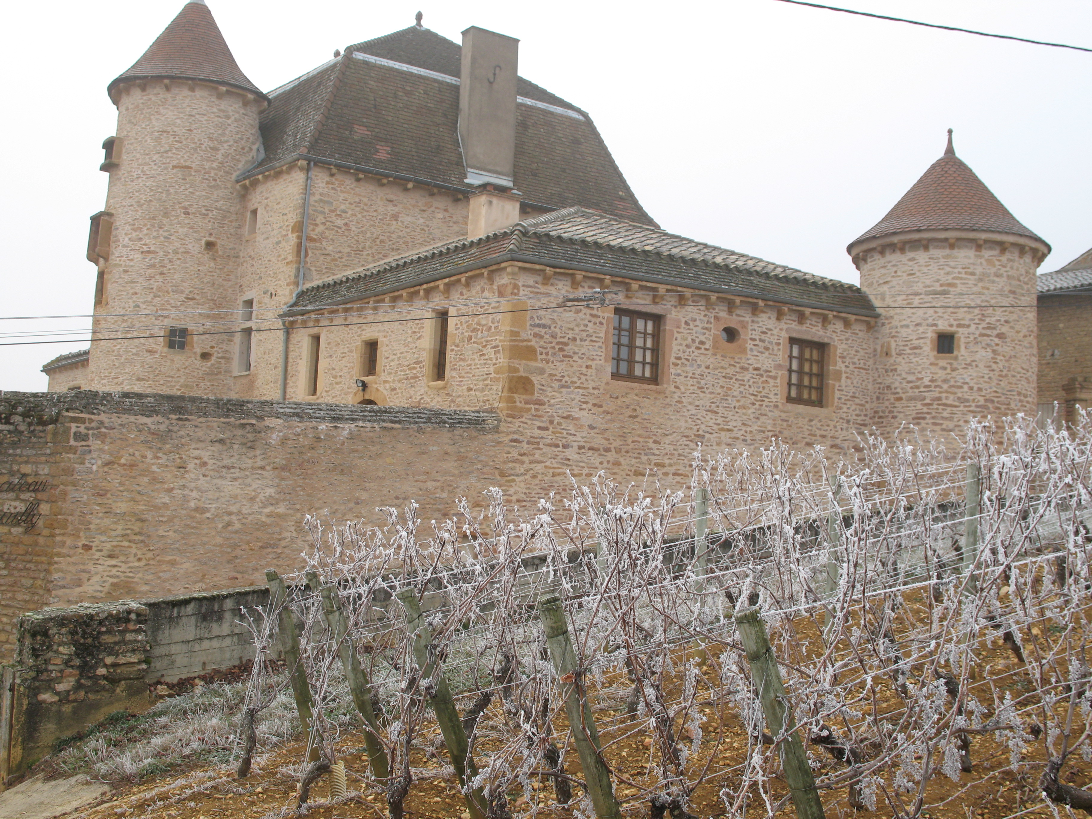 château de Pouilly - Fuissé (Saône-et-Loire)